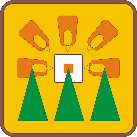 Escudo del municipio de José María Morelos, Quintana Roo, México.